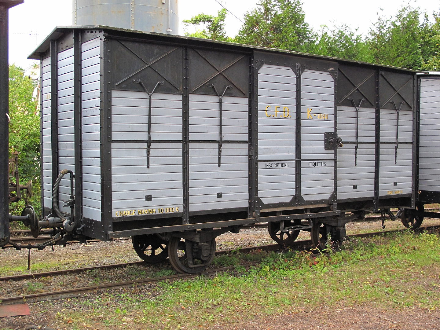 Le wagon couvert K 4044 ex-CFD Vivarais au Musée des tramways à vapeur et des chemins de fer secondaires français, à Butry-sur-Oise le 03/10/2010.